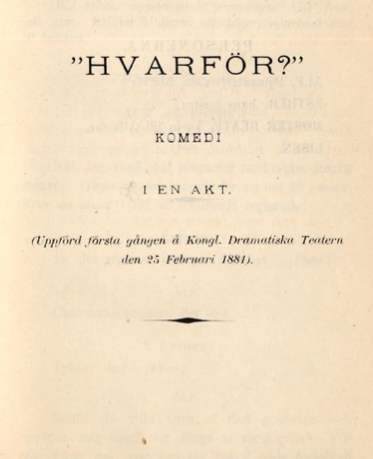 Hvarför